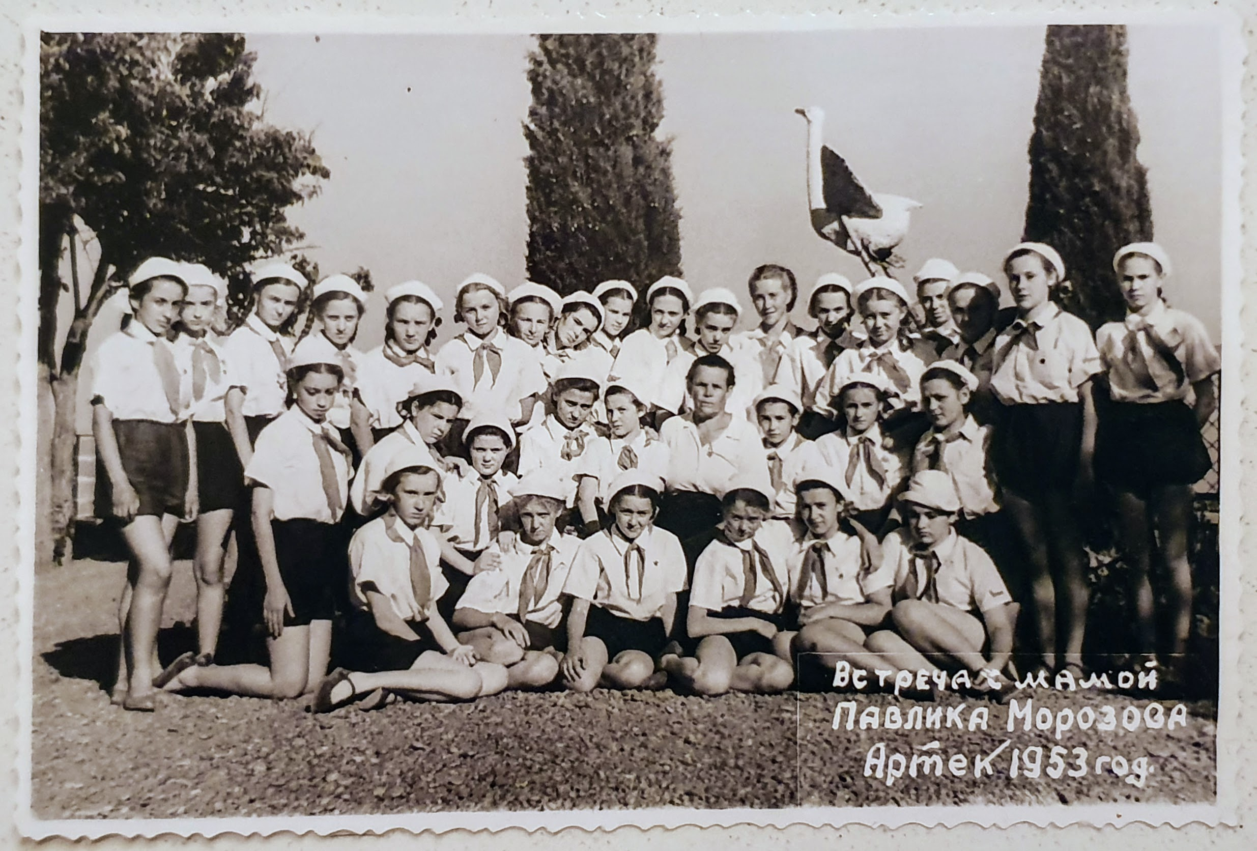 Встреча с мамой Павлика Морозова пионеров, проводящих летние каникулы 1953 года в пионерском лагере Артек, 1953 г